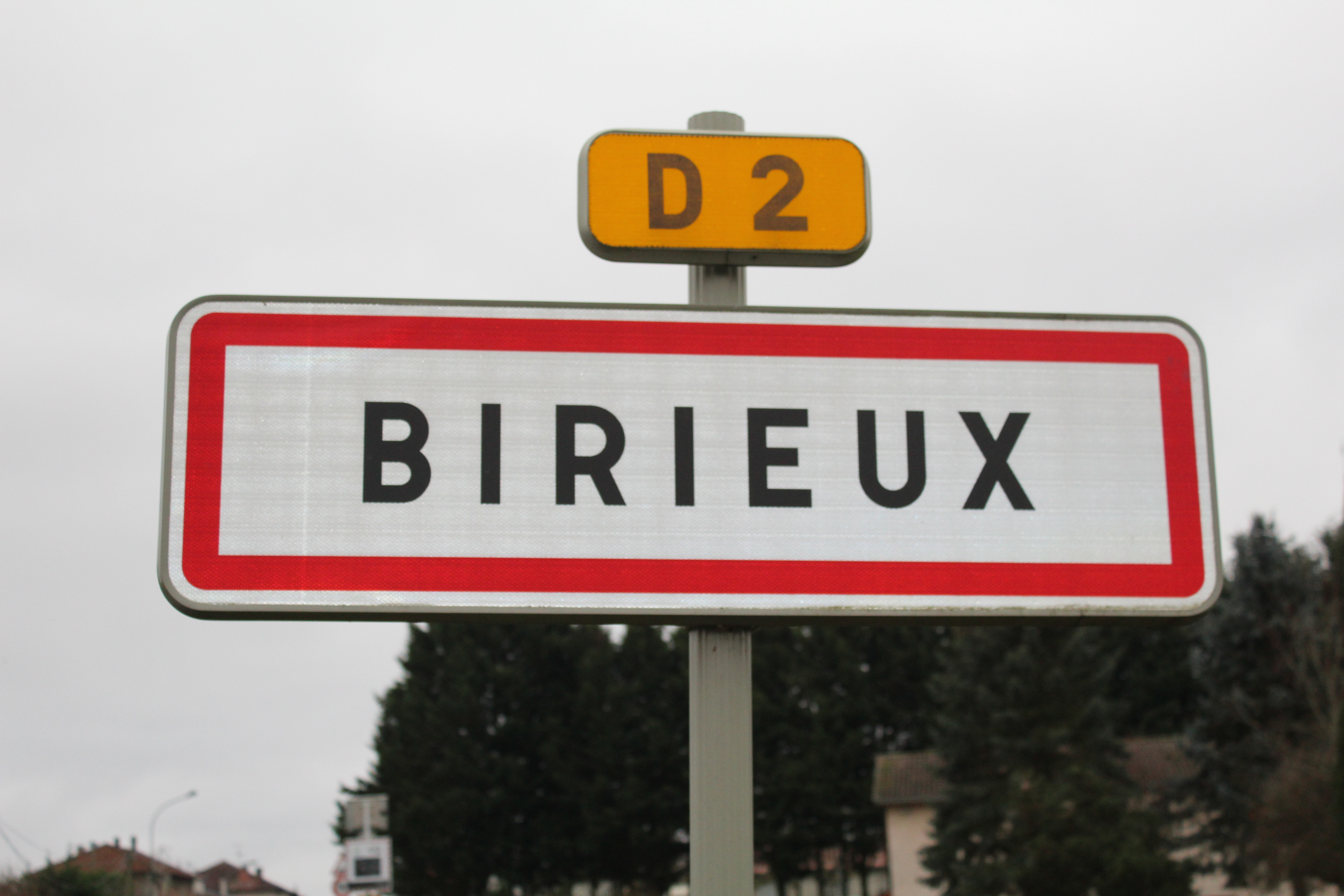 Panneau d'entrée dans Birieux.